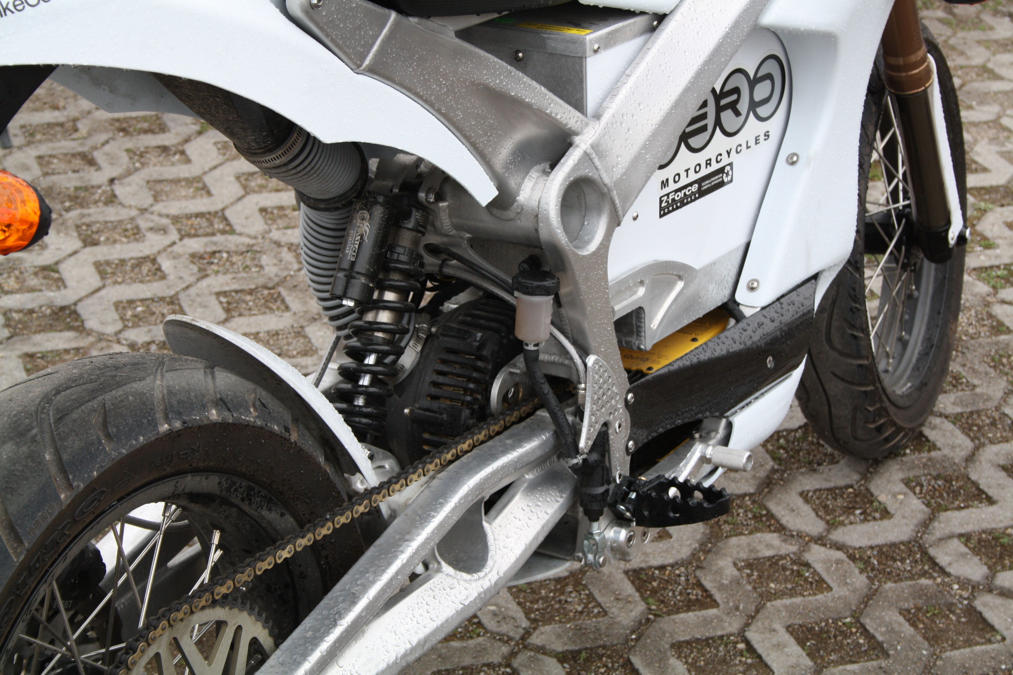 Zero Motorcycles, Detail Motor und Lithium-Ionen-Batterie